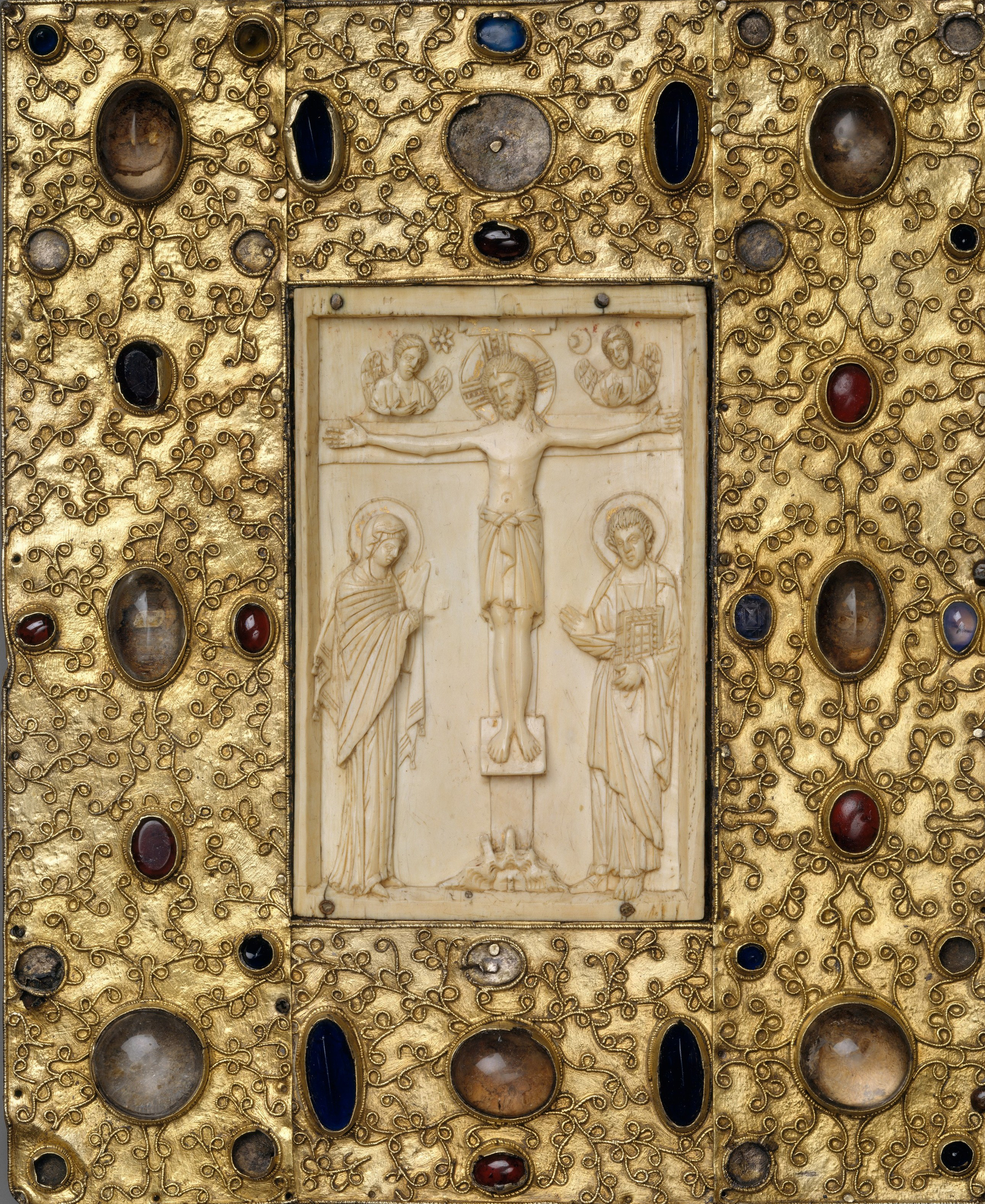 Cubierta del Evangelario de la reina de Aragón Felicia de Roucy, esposa de Sancho Ramírez (rey de Aragón 1063–1094), casada ca. 1070 con el monarca aragonés. Esta cubierta incorpora un relieve bizantino en marfil.